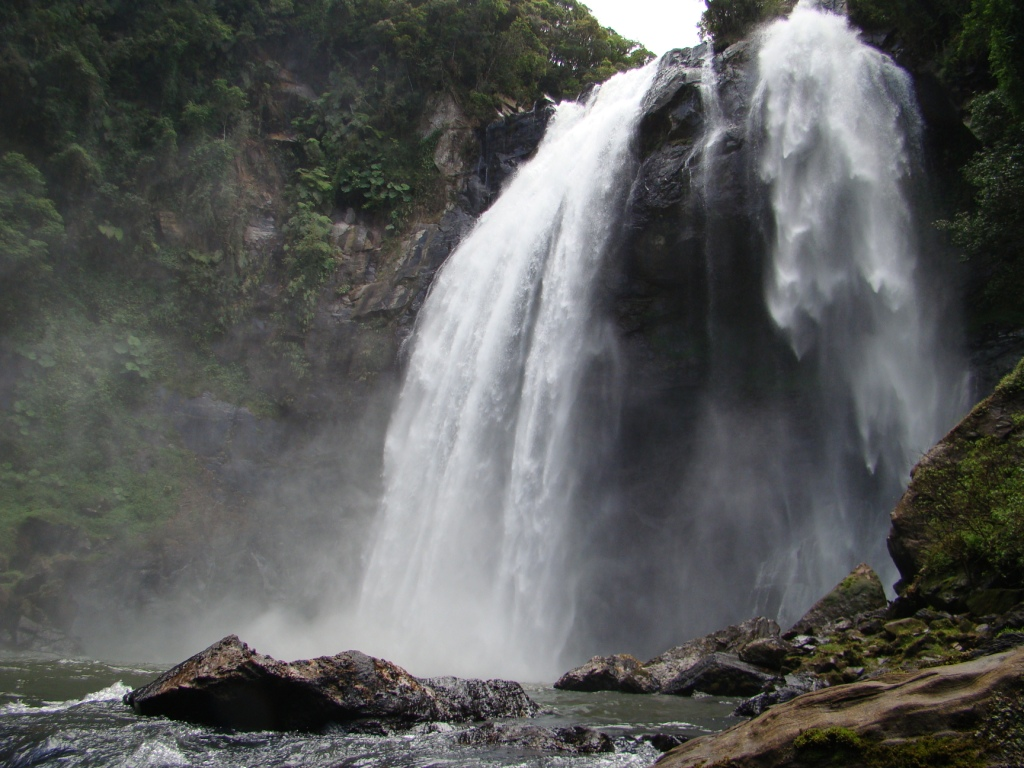 Cachoeira Véu de Noiva - Doutor Pedrinho - SC